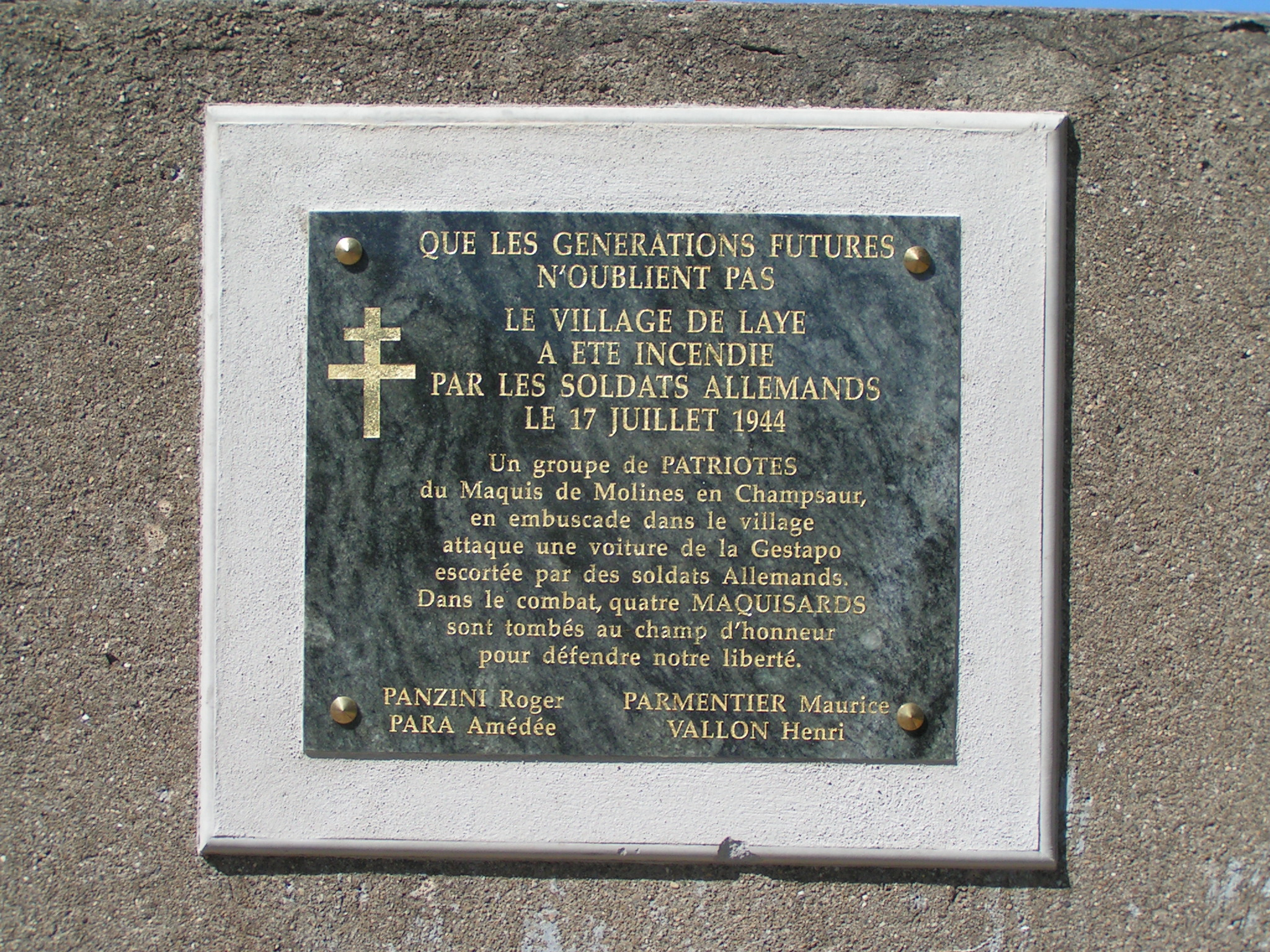 plaque commémorative en hommage aux quatre résistants tués lors du combat de Laye du 17 juillet 1944